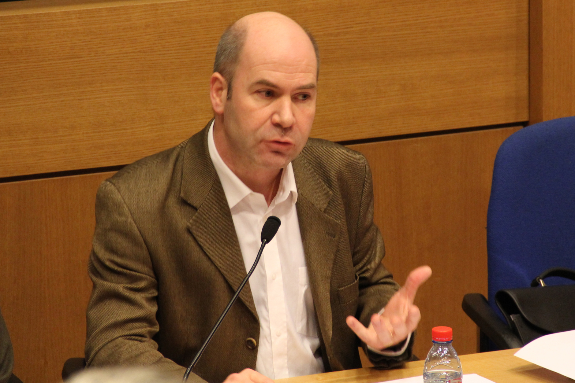 Débat des candidats à la présidence de l'EHESS, Pierre-Cyrille Hautcœur, amphithéâtre, 16/11/2012.